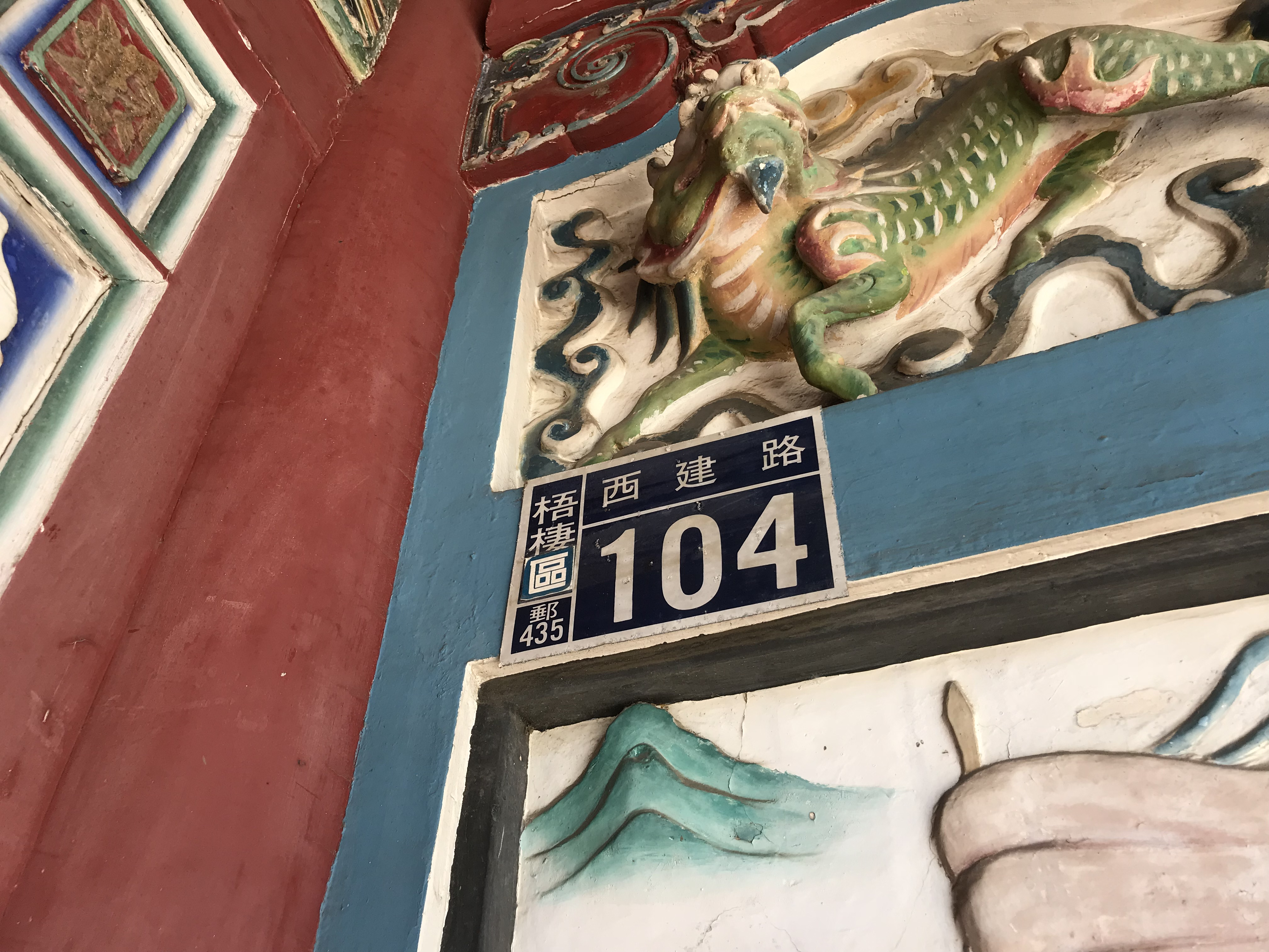 中文（台灣）: 梧棲真武宮門牌